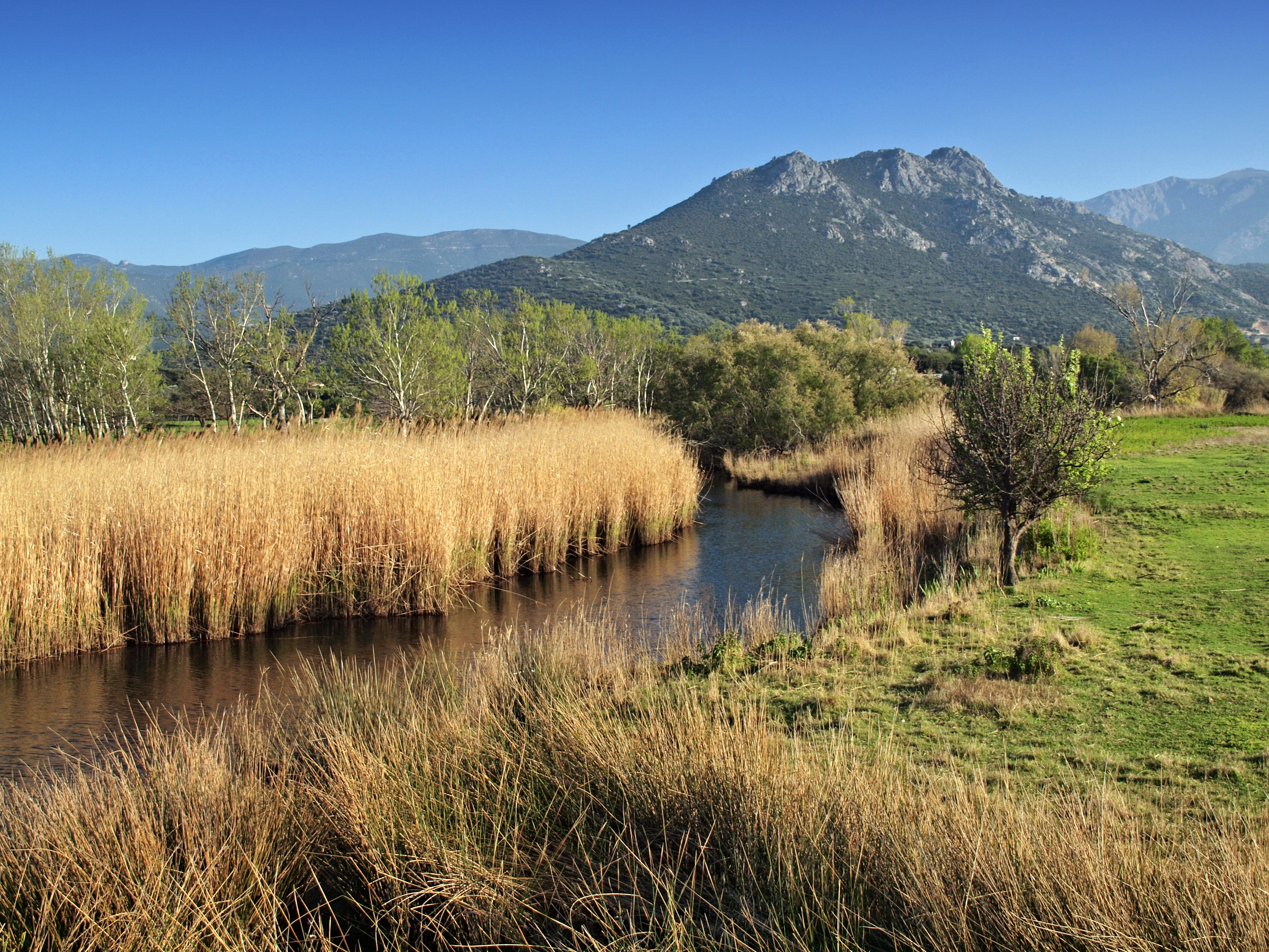 Belgodère (Corse) - Le Regino en aval de son embouchure